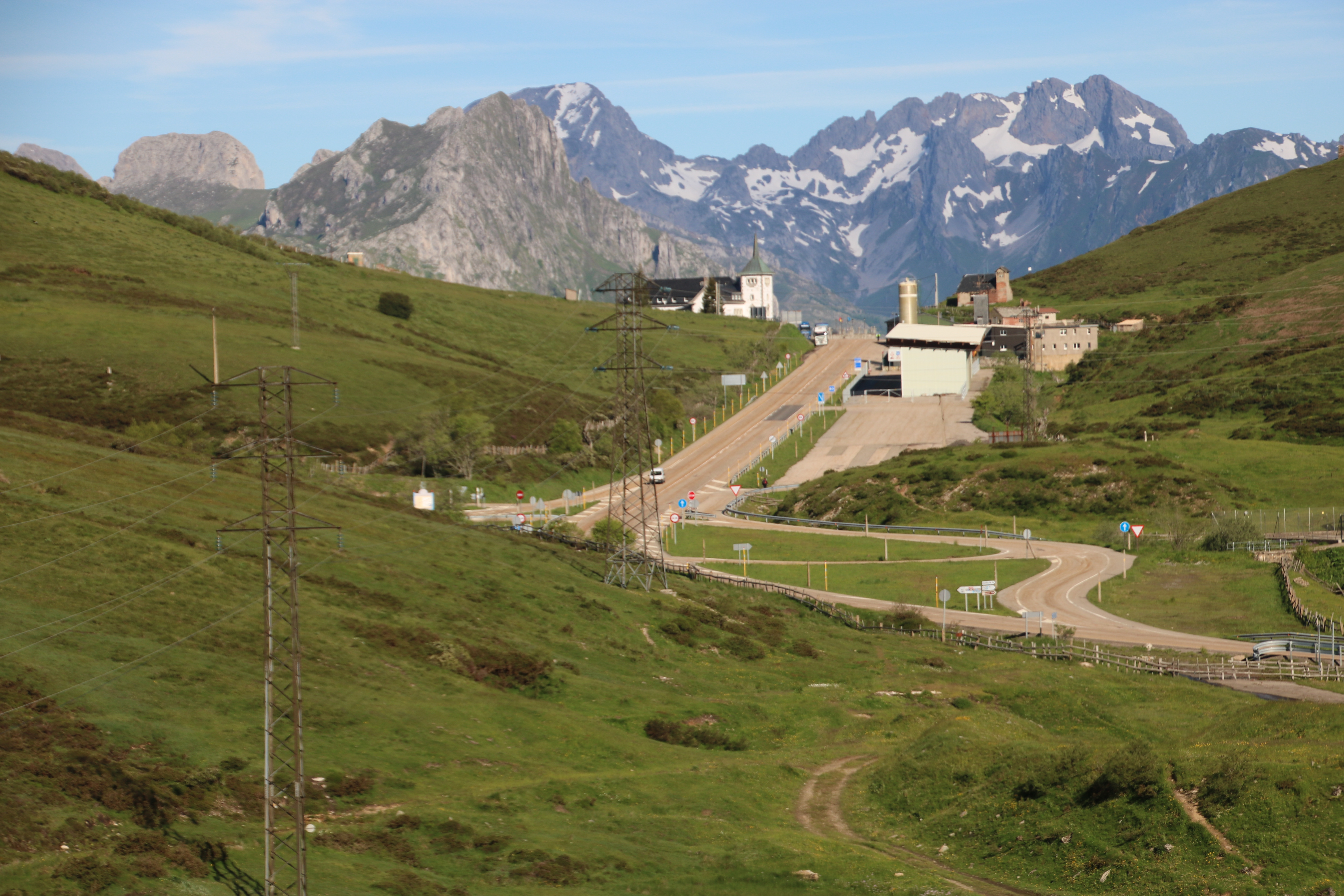 Camino de San Salvador_tappa da Poladura de la Tercia a Pajares